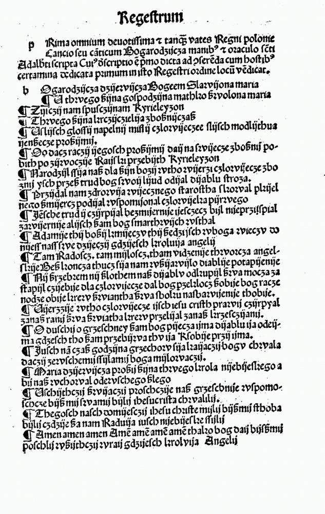 Bogurodzica na karcie Statutów Jana Łaskiego, 1506, drukarnia krakowska Jana Hallera.